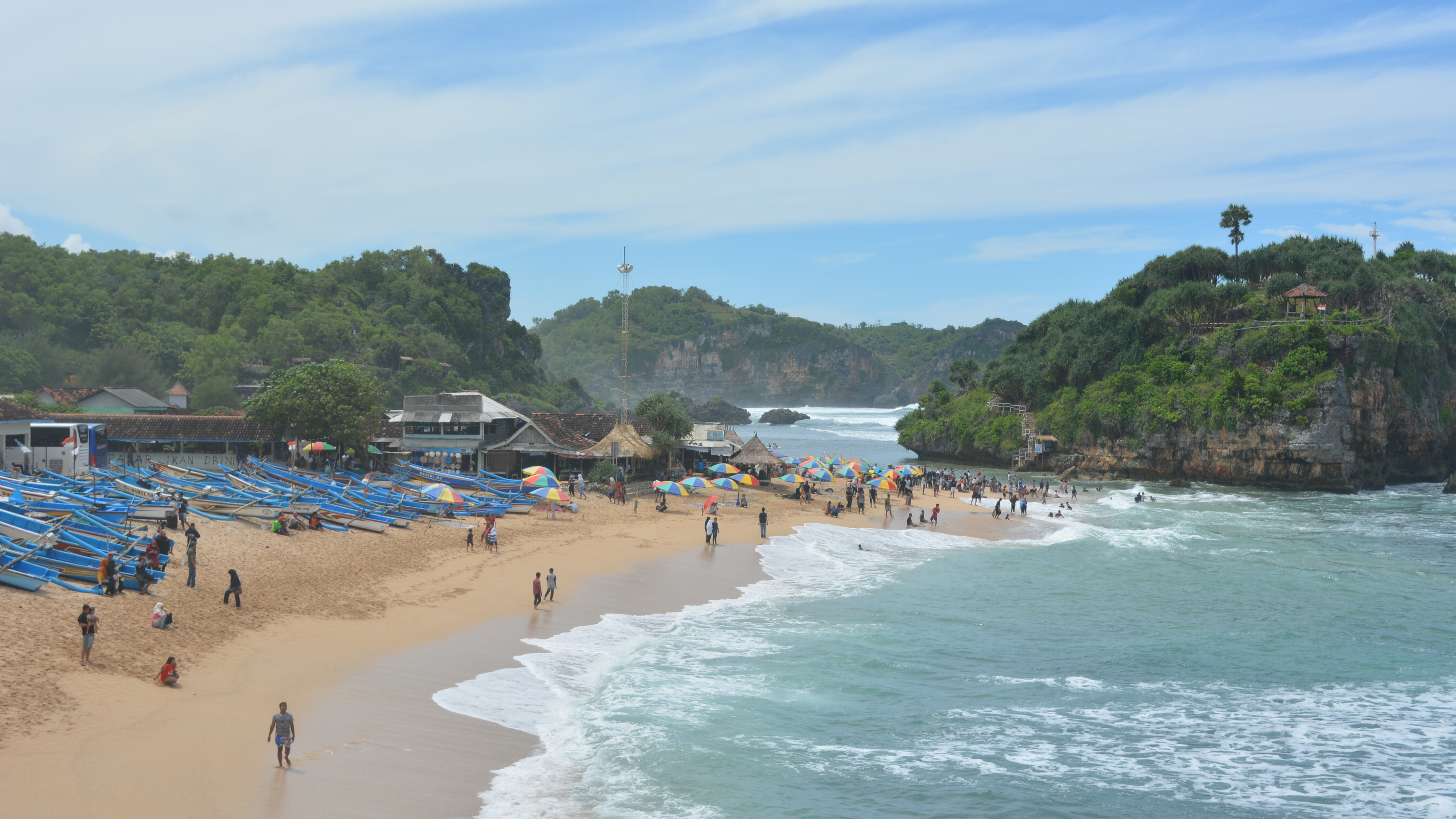 Pemandangan Pantai Drini dilihat dari atas.